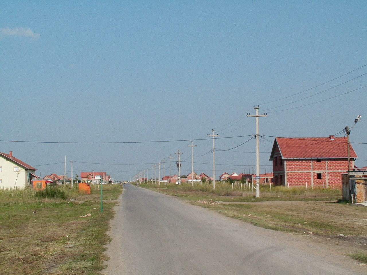 Насеље Грмовац